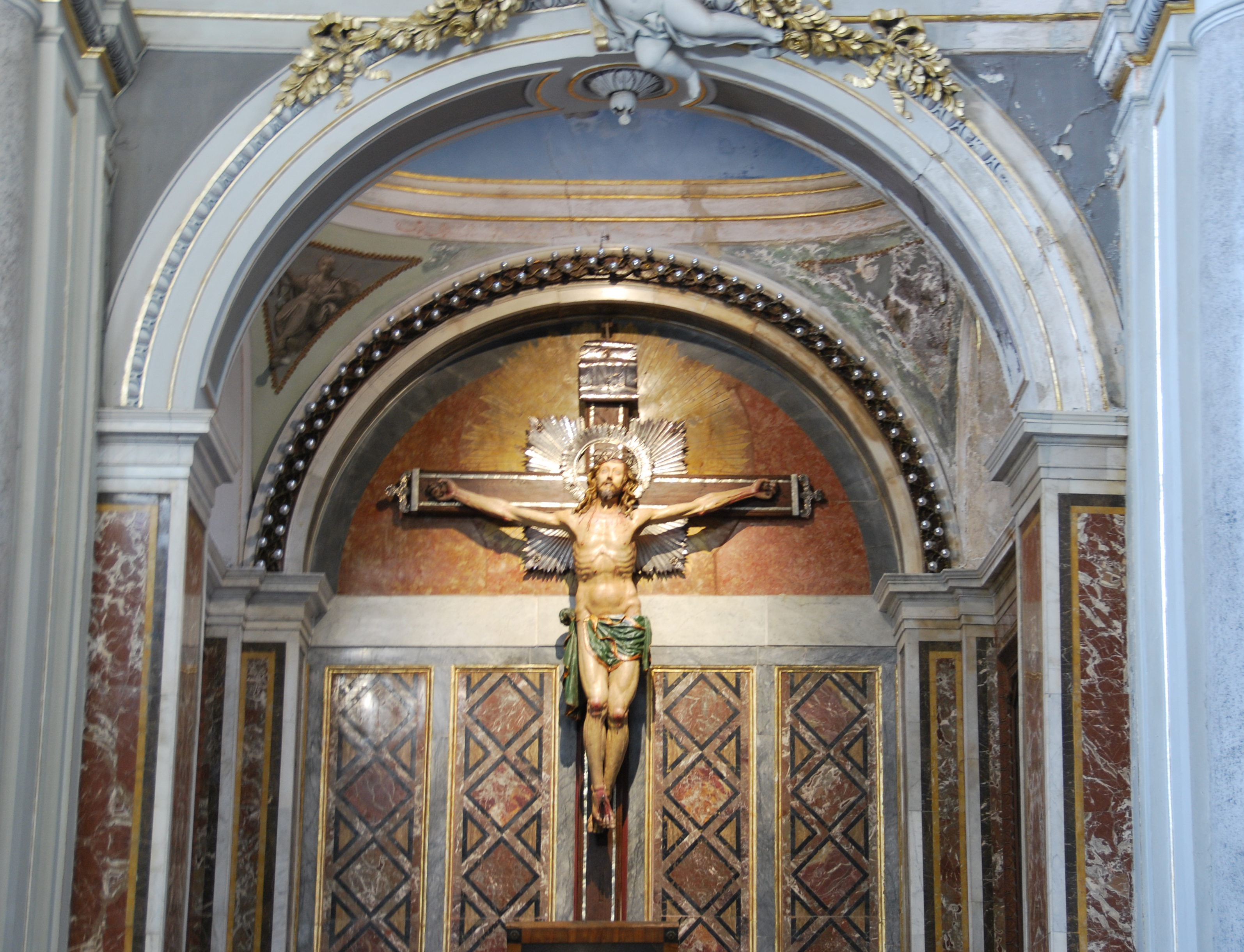 Crocifisso nella cattedrale di Nicosia